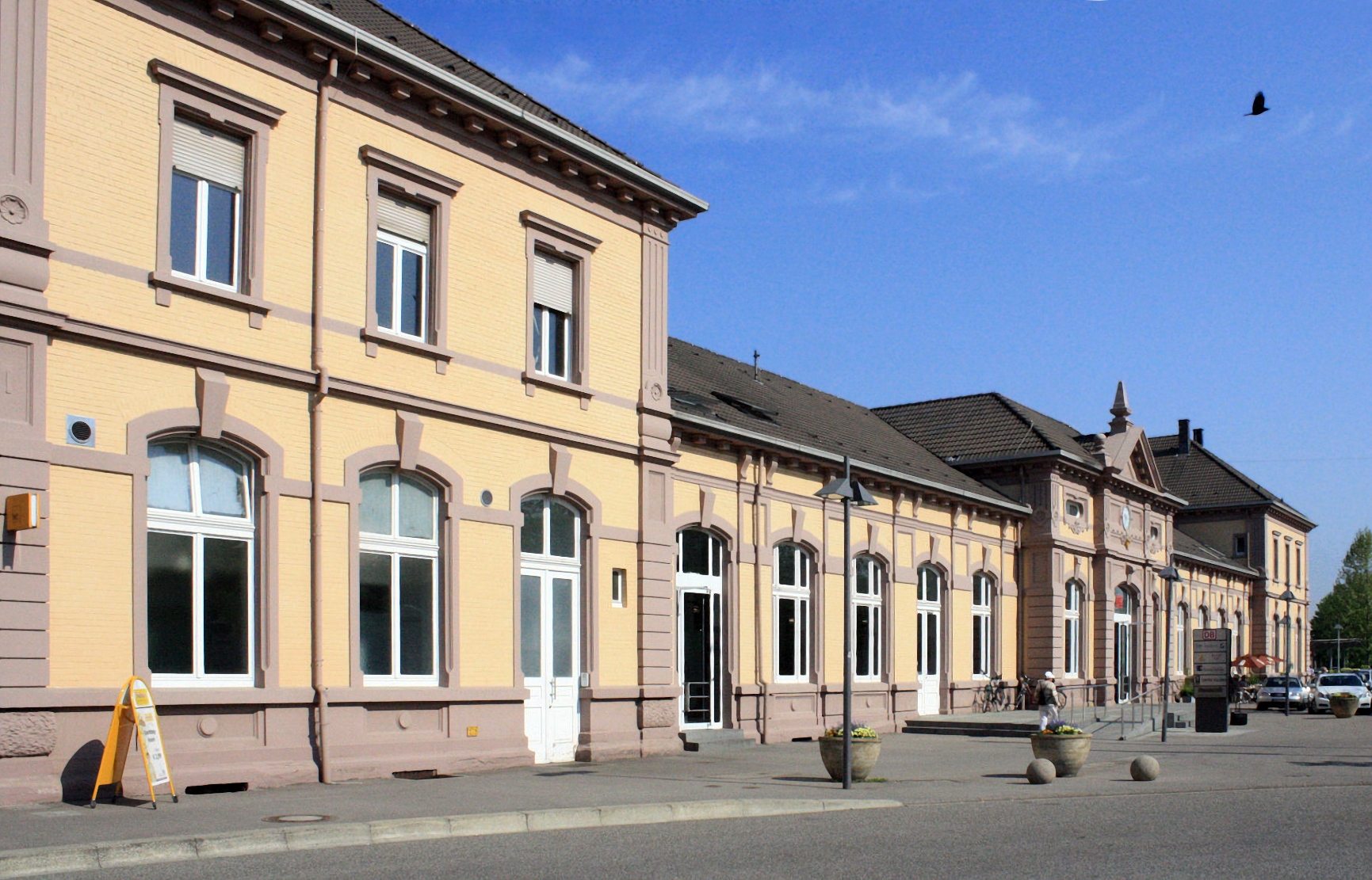 Alter Bahnhof, Oos, Baden-Baden